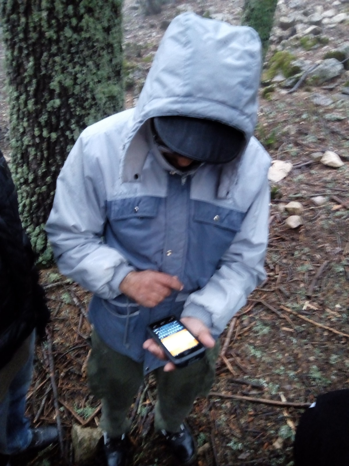 Collecte des données d'inventaire avec un smartphone dans les forêts de cèdre dans la forêt d'Azrou au Maroc